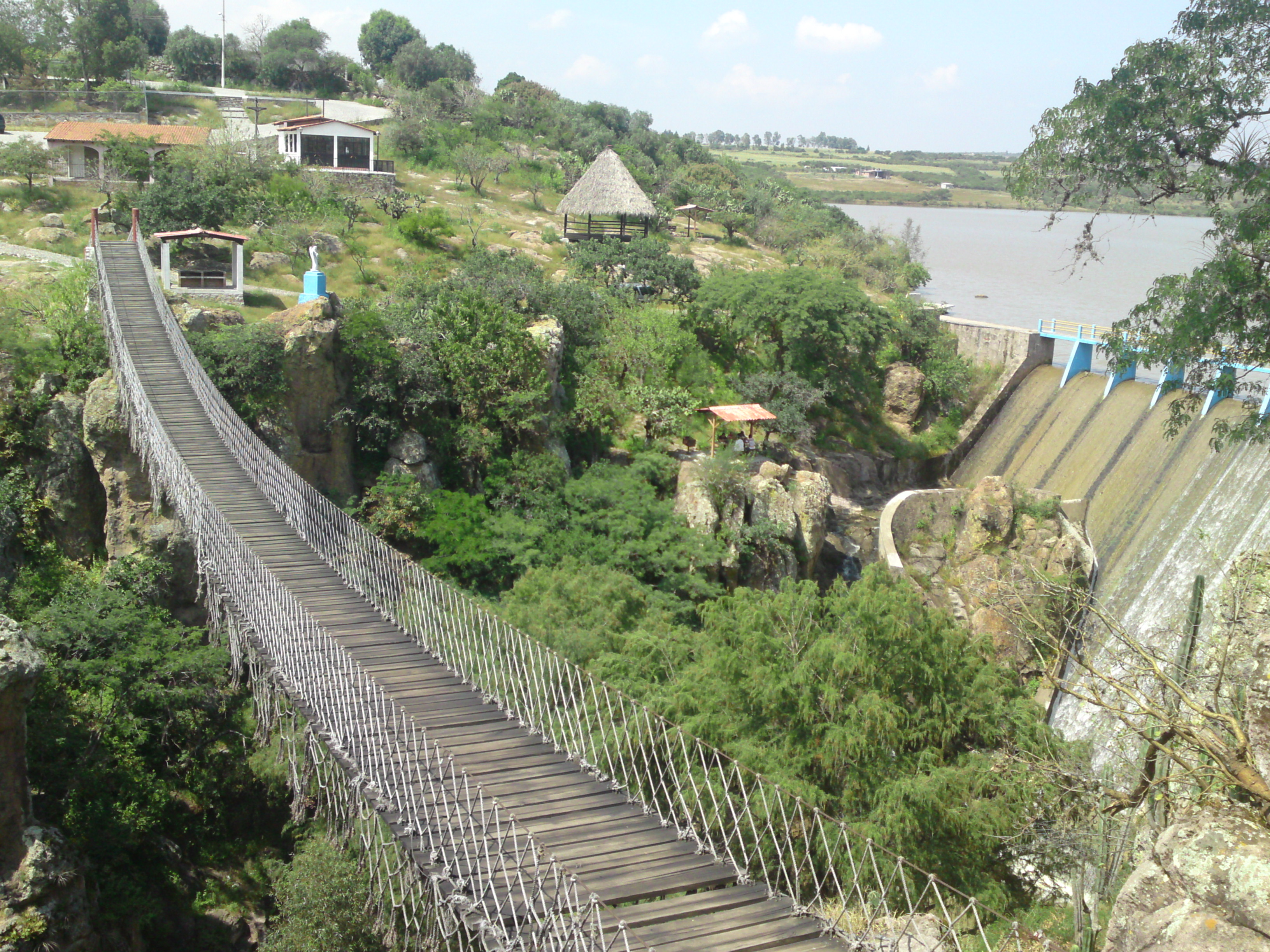 Puente colgante presa del jugete